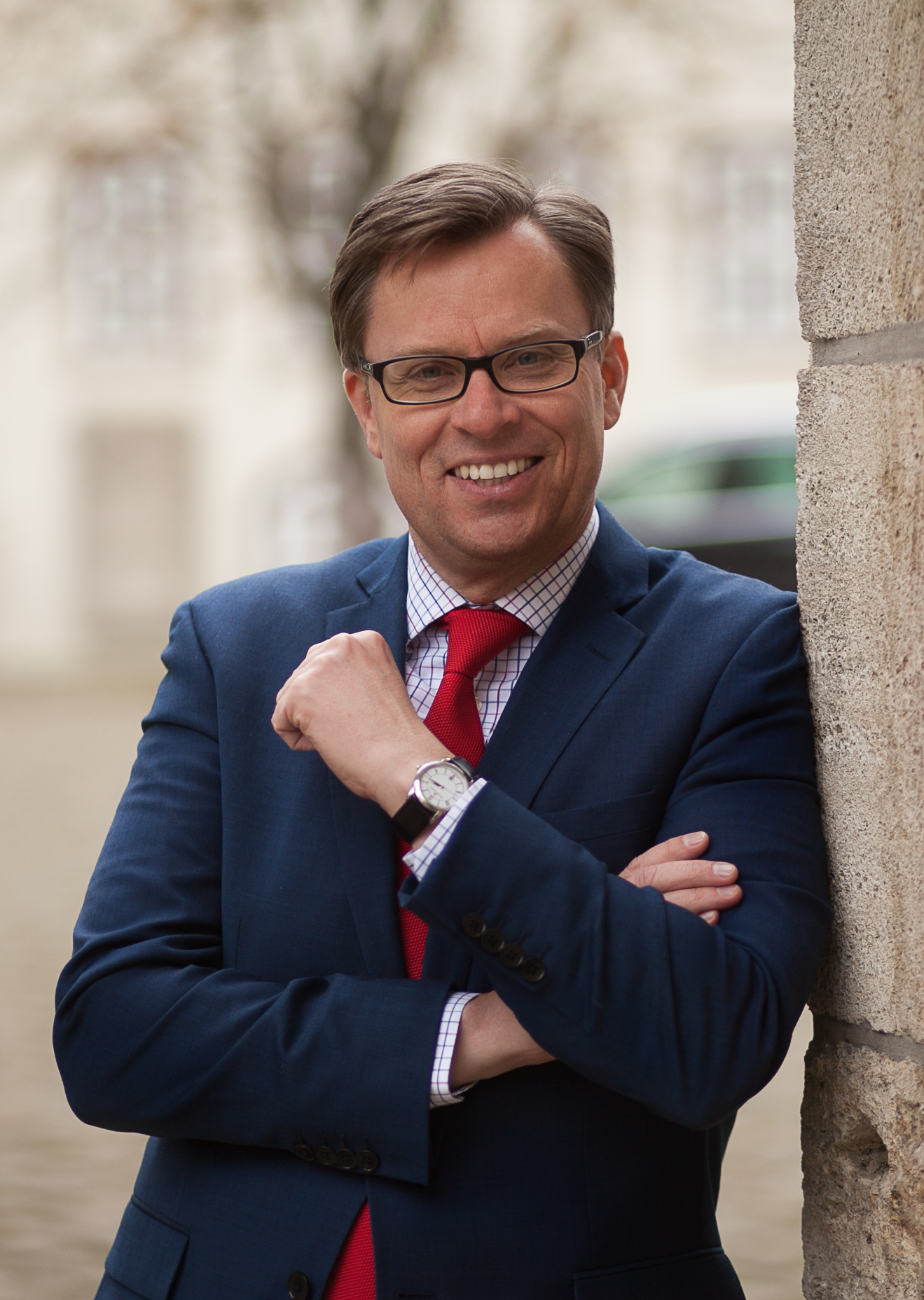 Landrat Dr. Andreas Ebel, Landkreis Gifhorn